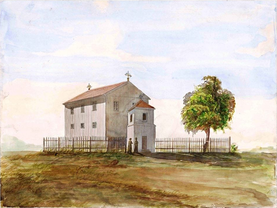 Беларуская (тарашкевіца): Маладэчна (Maładečna). Царква Покрыва Багародзіцы